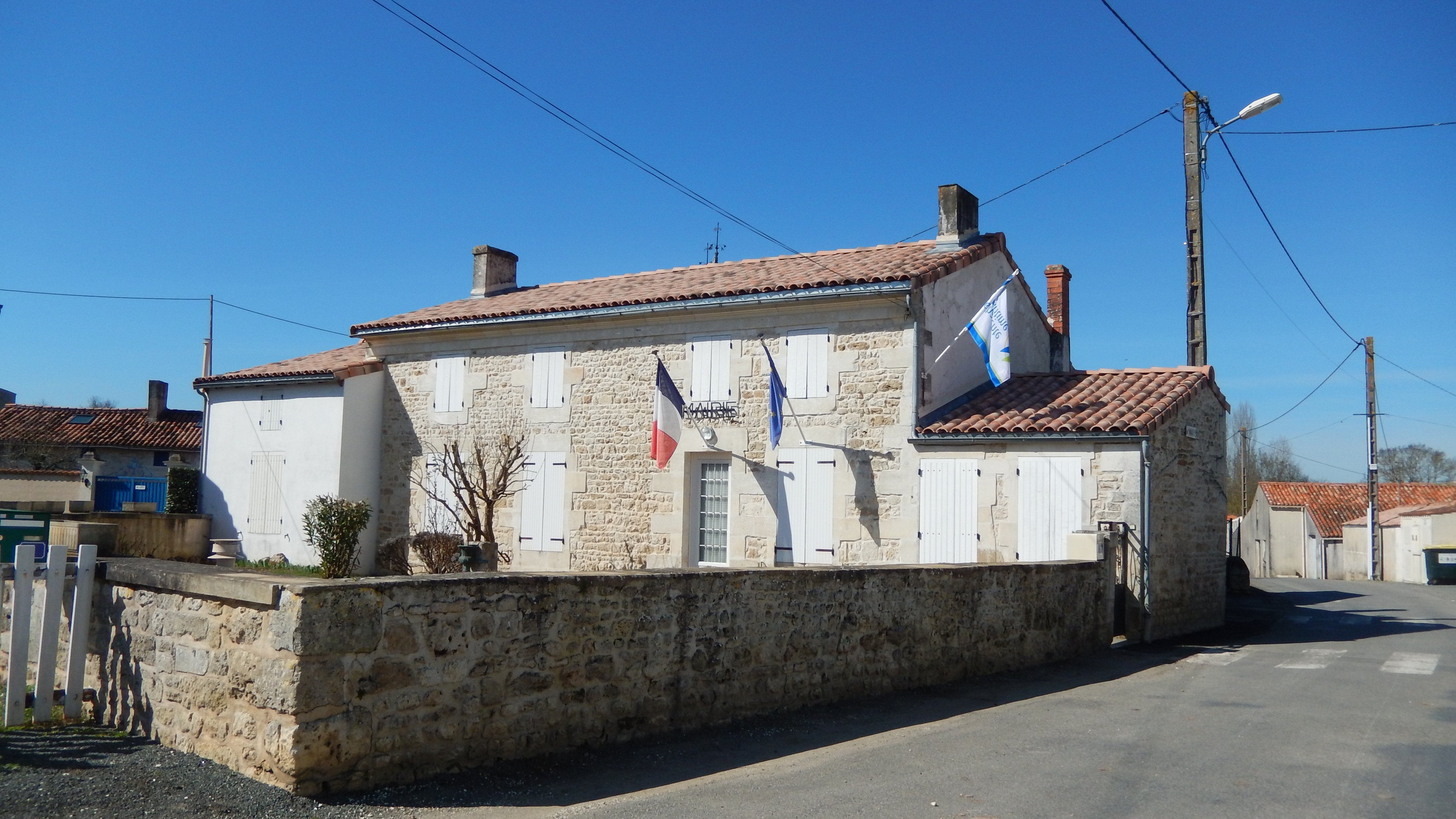 La mairie de la commune de Champdolent (Charente-Maritime, France).